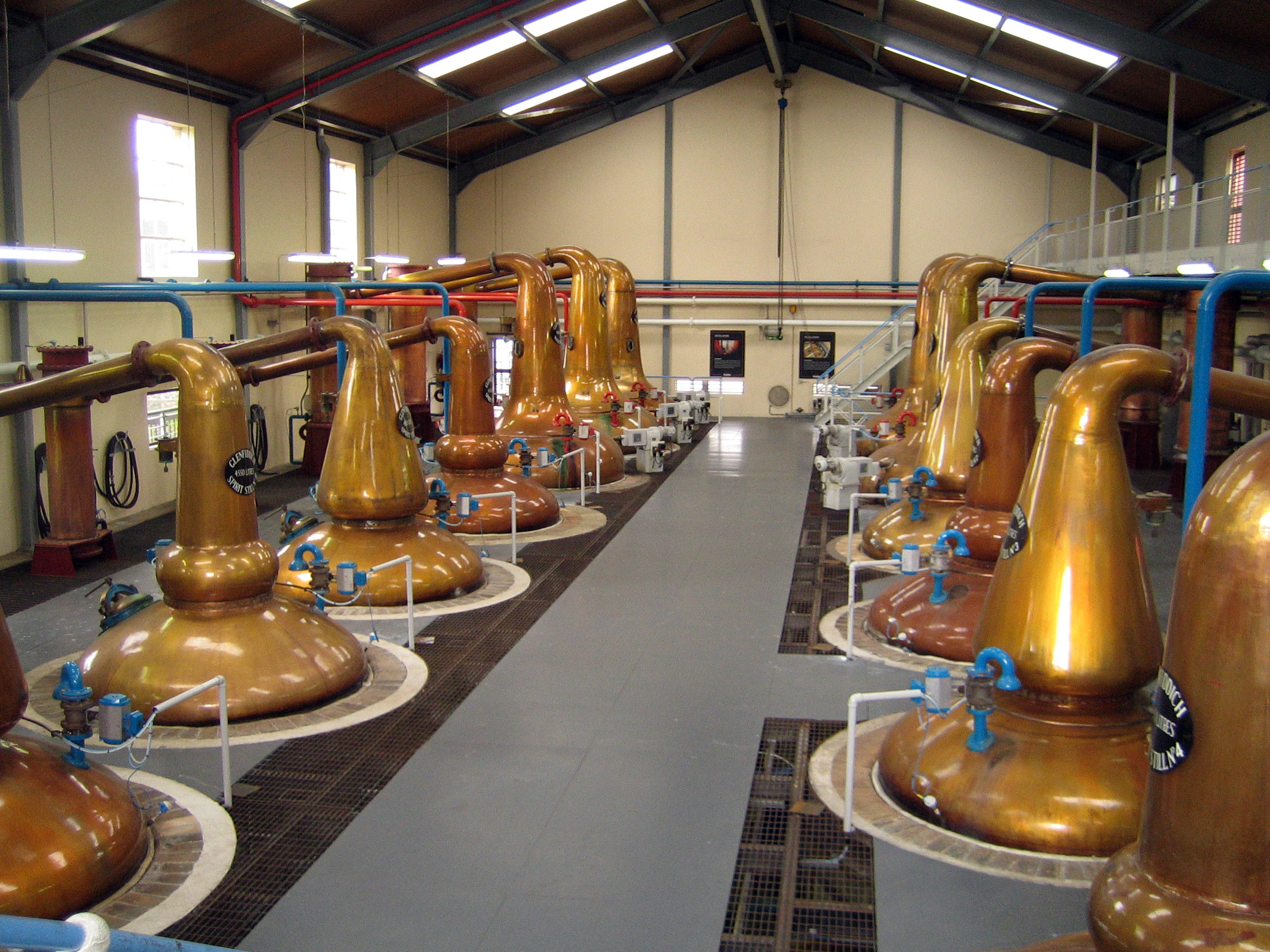 Source : Antonin MARCEL Description : Salle des Alambics Ã Glenfiddich Source oeuvre personnelle de anton lecram aka Antonin MARCEL : prise lors de la visite publique de la distillerie Glenfiddich en Ecosse